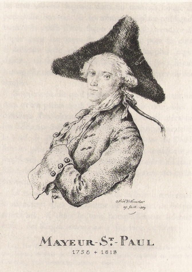 Gravure de Hillemacher extraite de De Manne et Ménétrier, Galerie historique des comédiens de la troupe de Nicolet, Lyon 1869. Collection privée.